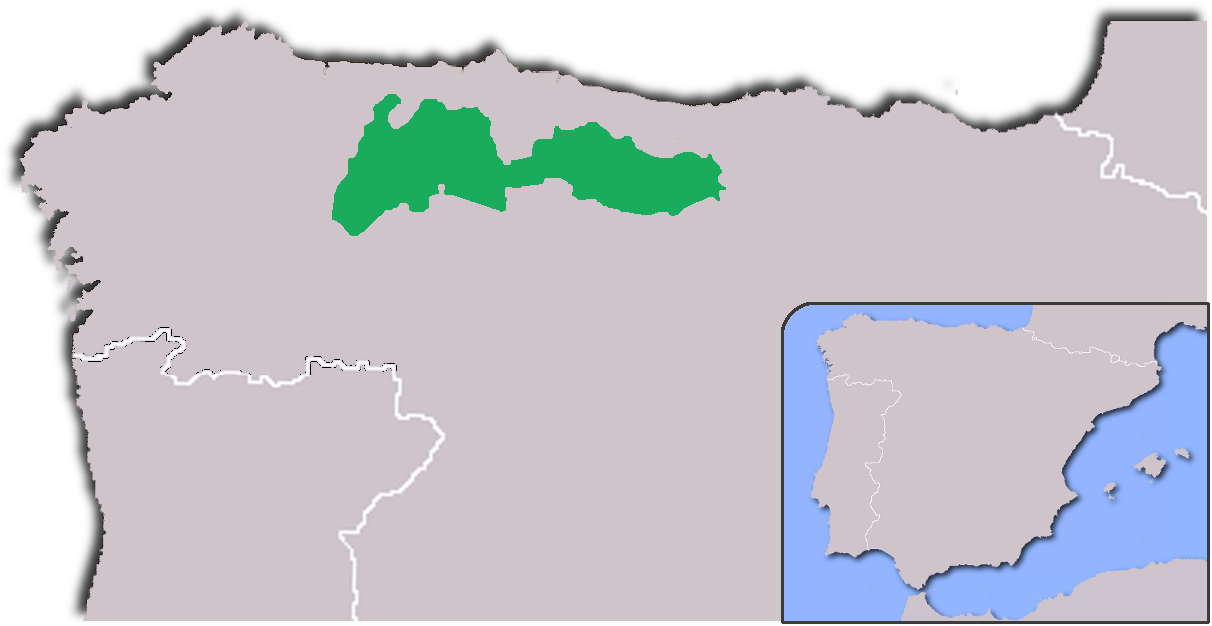 Mapa de distribución del oso pardo cantábrico (Ursus arctos arctos) en España para el año 2017. Datos extraidos de Folleto OCAs 2017.